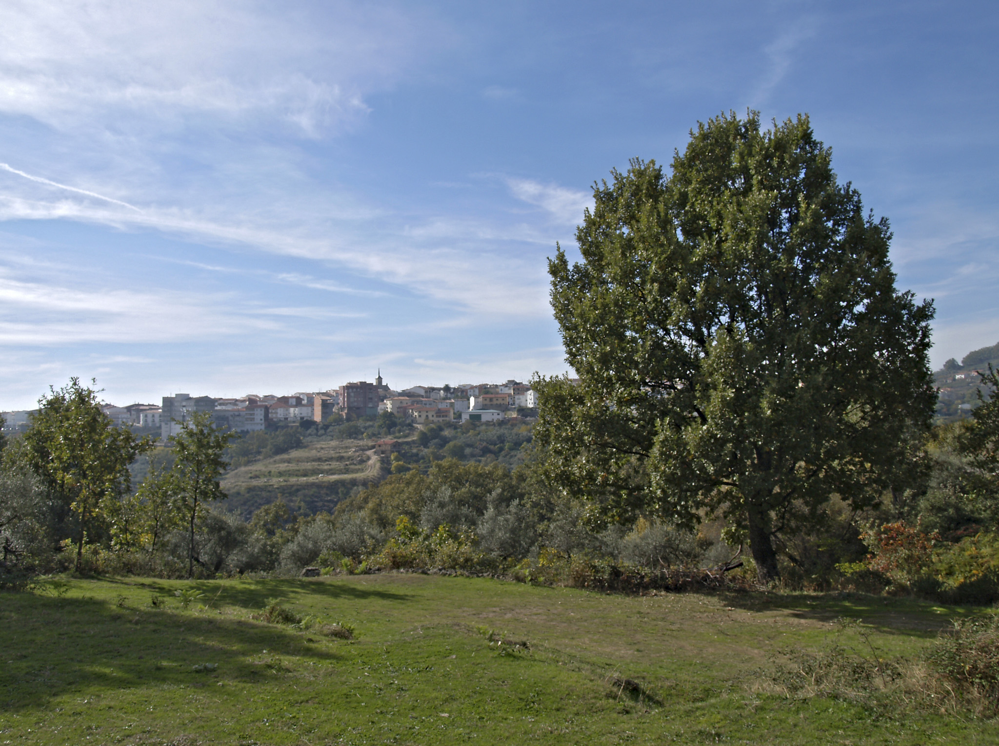 Losar de la Vera desde el Norte, con Quercus pyrenaica destacado (Cáceres, España). 11-noviembre-2007.